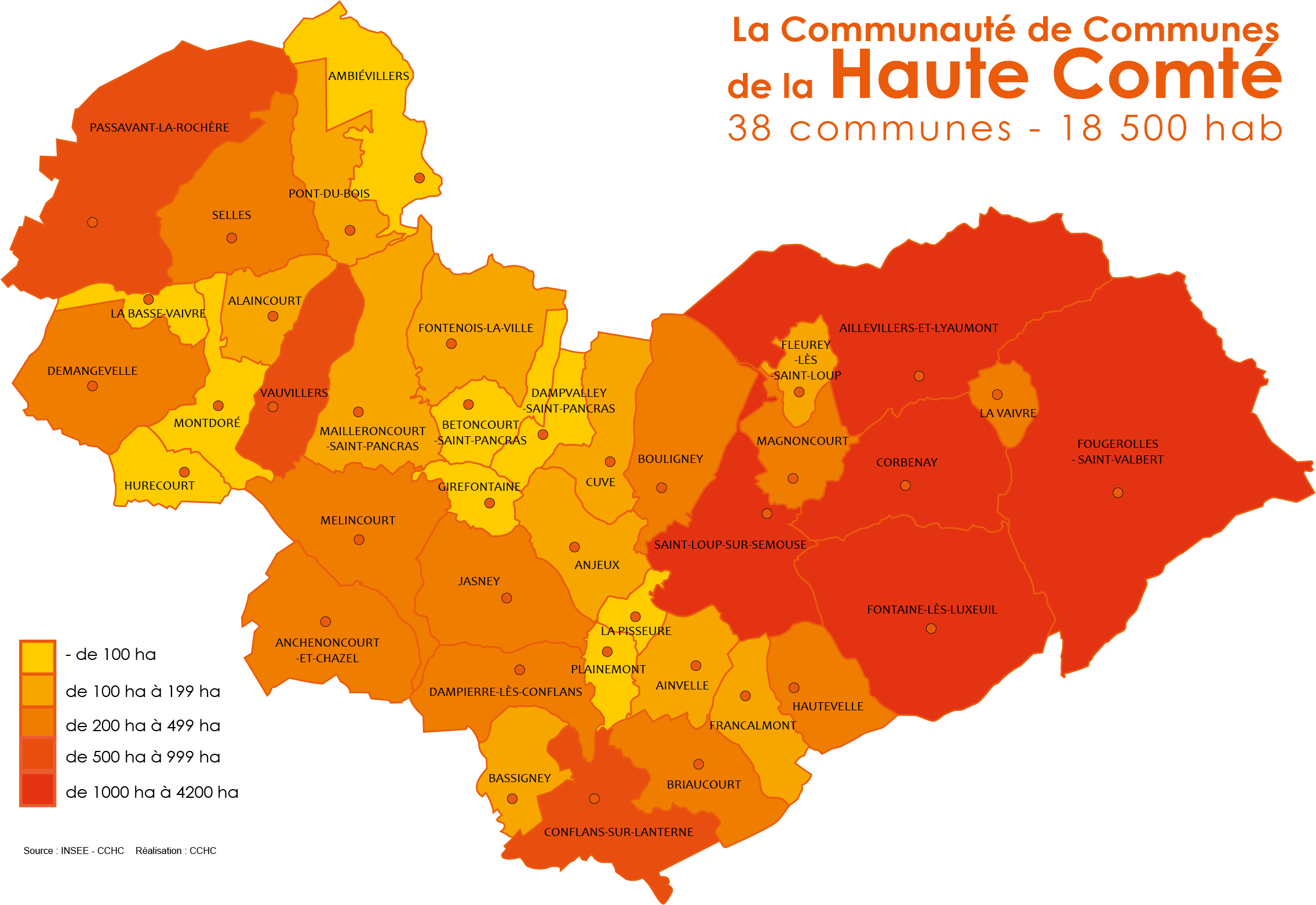 Carte démographique de la Communauté de Communes de la Haute Comté.